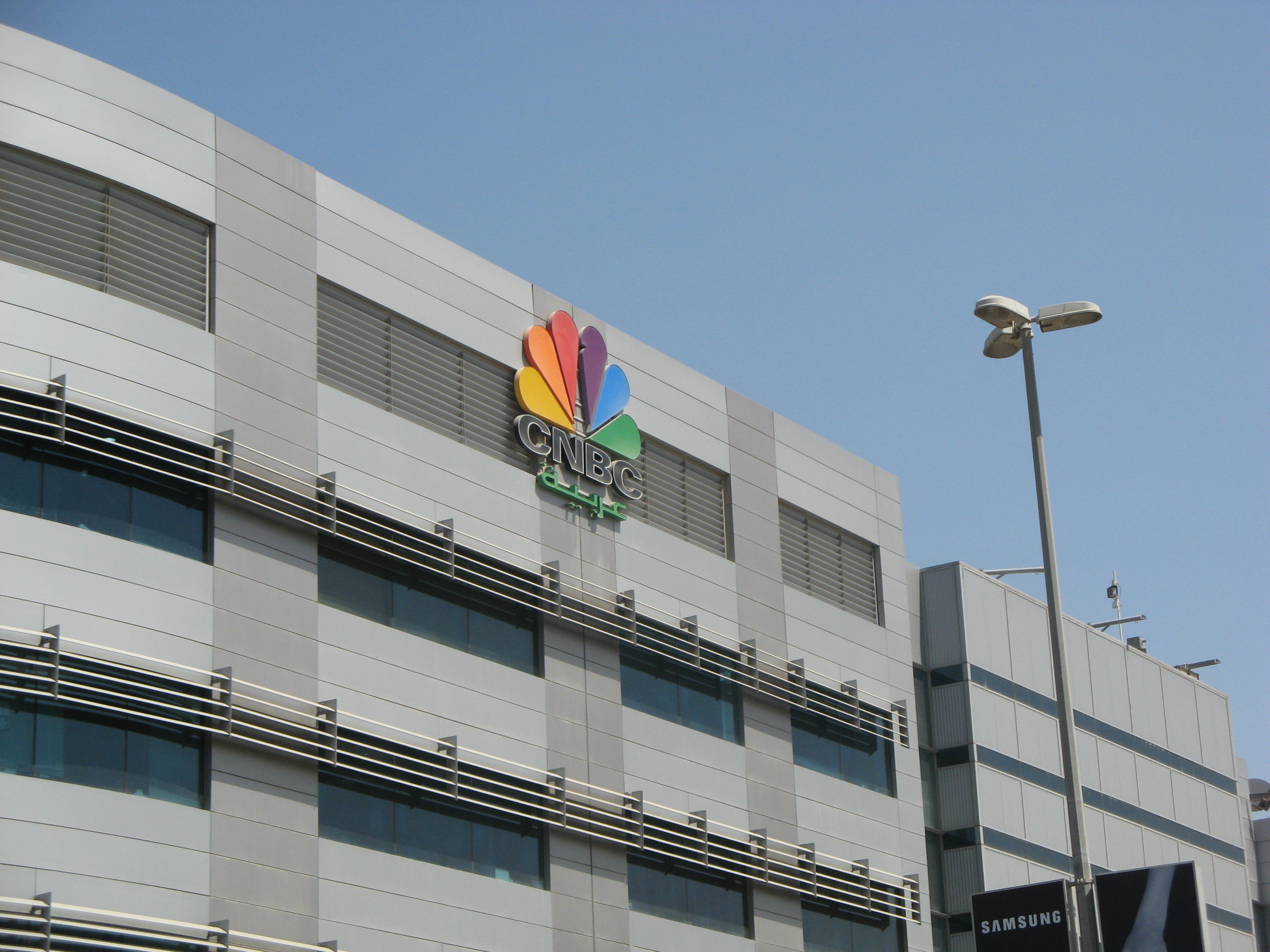 CNBC in DubaiCNBC in Dubai